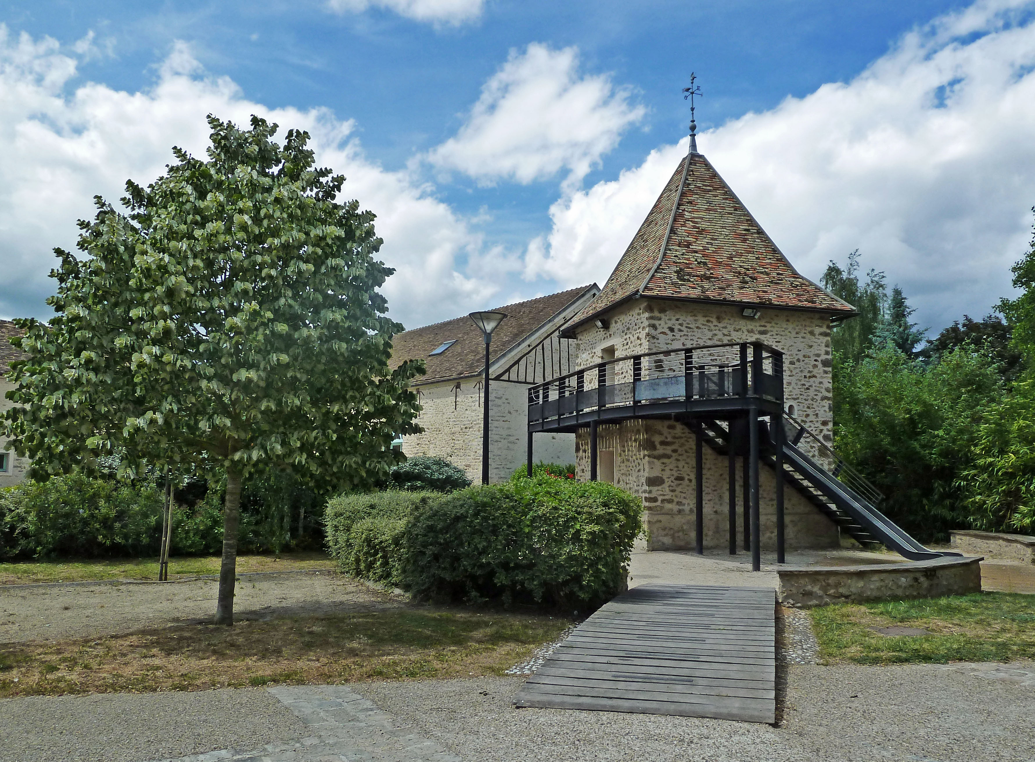 Pigeonnier à Avrainville (département de l'Essonne, région Île-de-France)